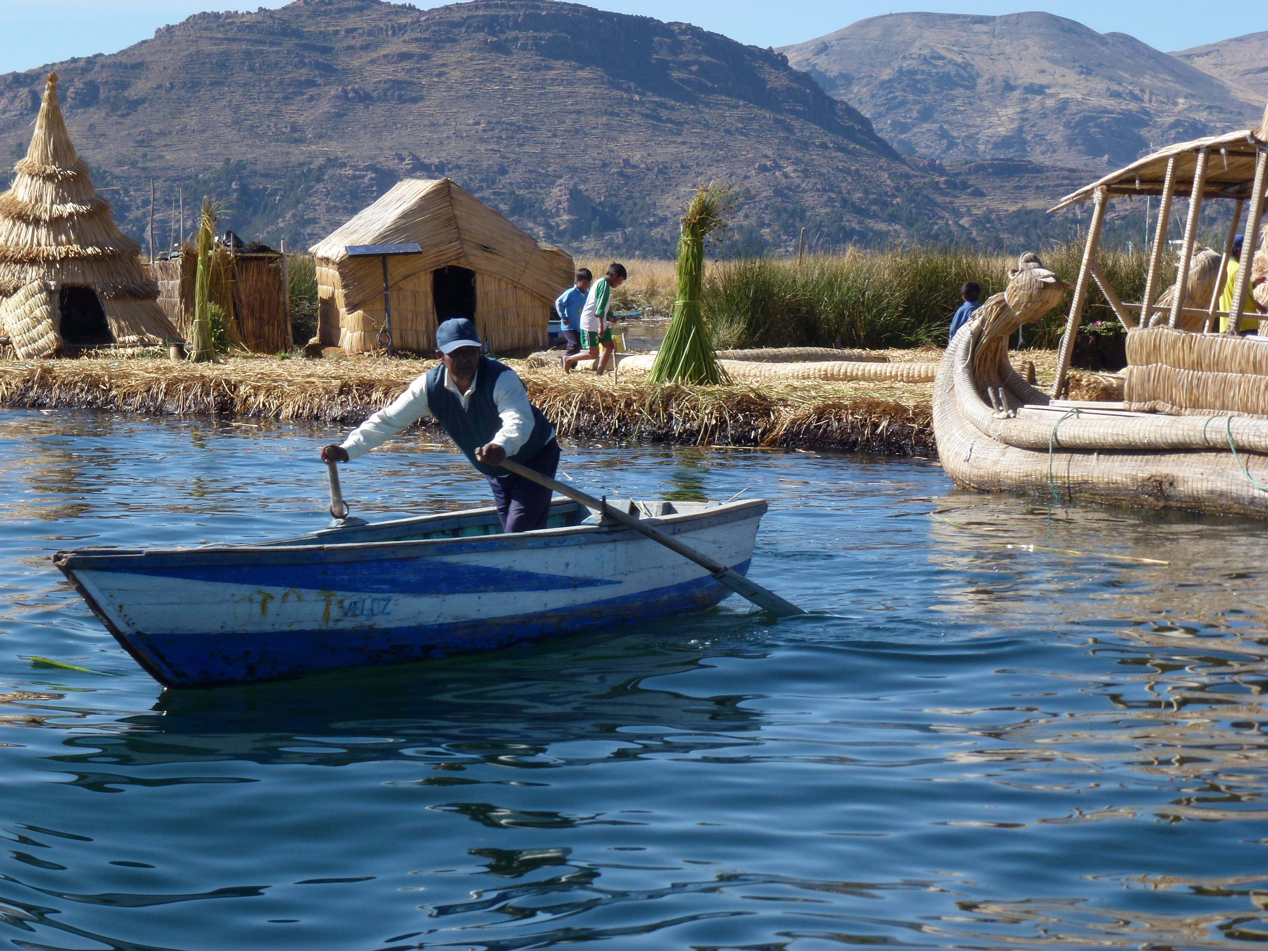 Sur le Lac Titicaca les Aymara du Pérou